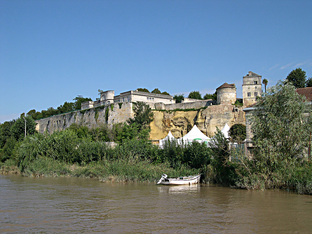 Bourg-sur-Gironde